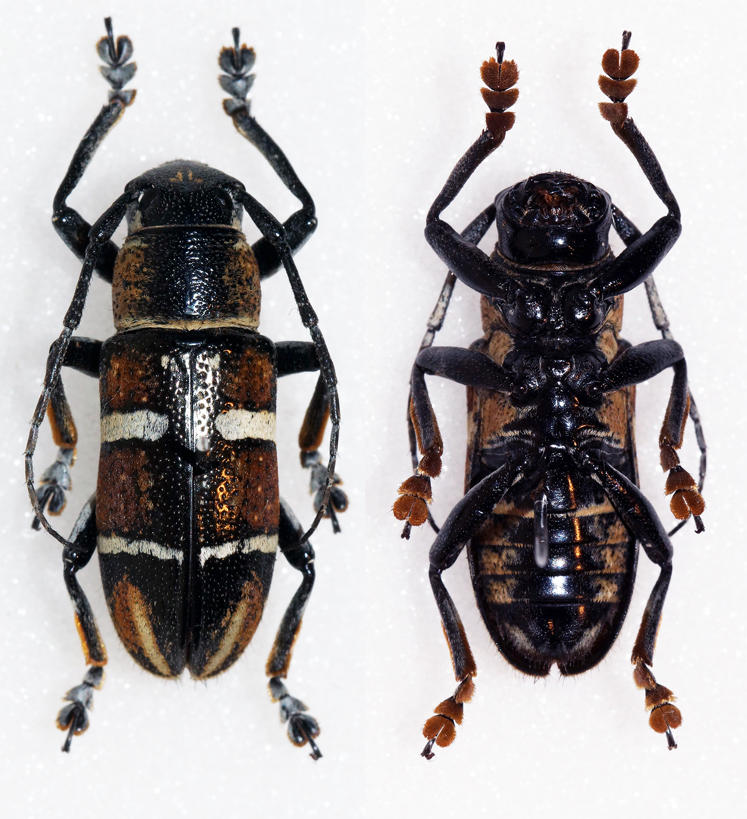 Hüdepohl,1987 Sex: Female Data: 09-2014 - Mt Kanlaon - 900m - Negros Island - Visayas - Philippines Size: 21mm